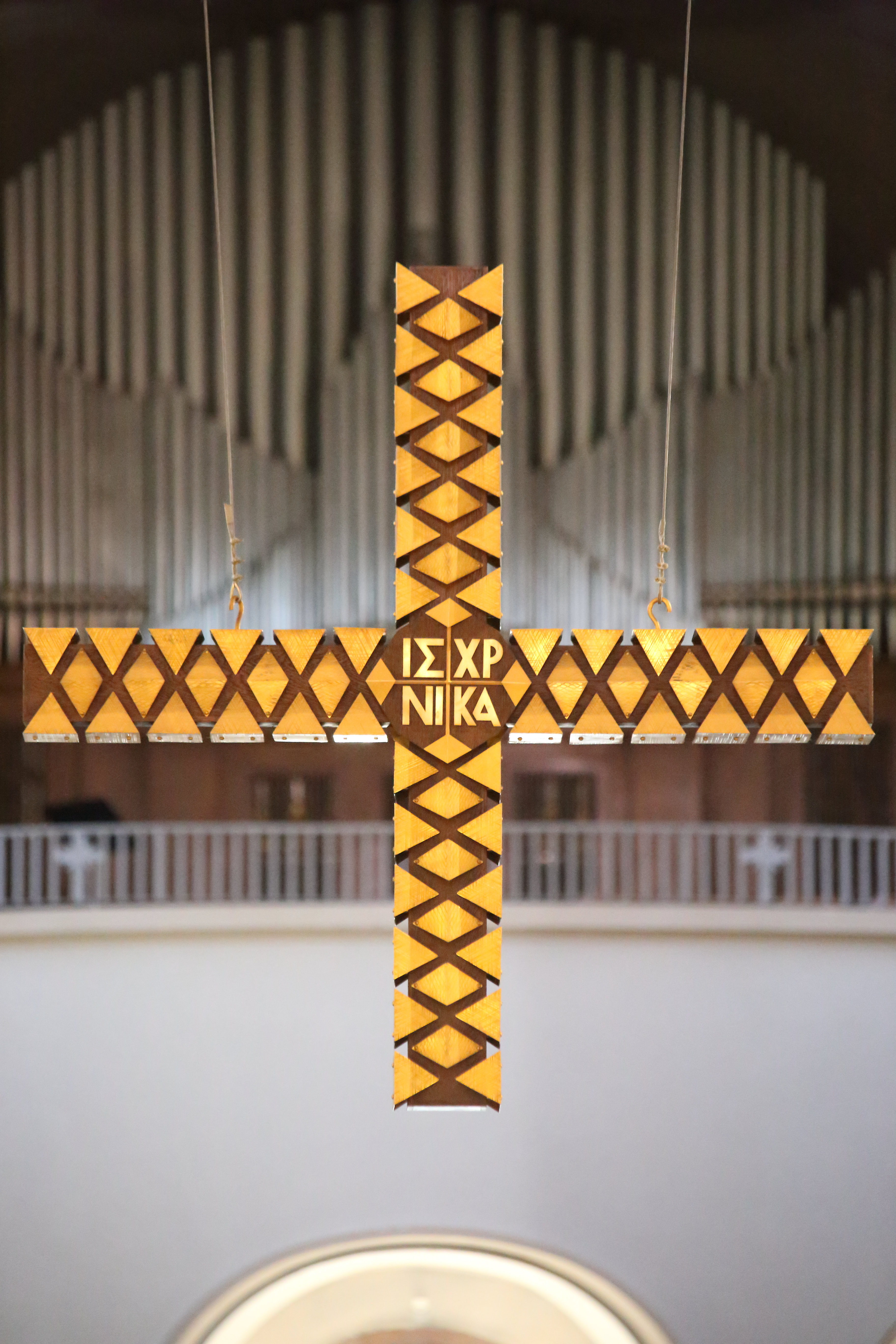 Blick vom Altar auf das dem Altar vorgelagerte Kreuz, das im Chorbogen hängt.